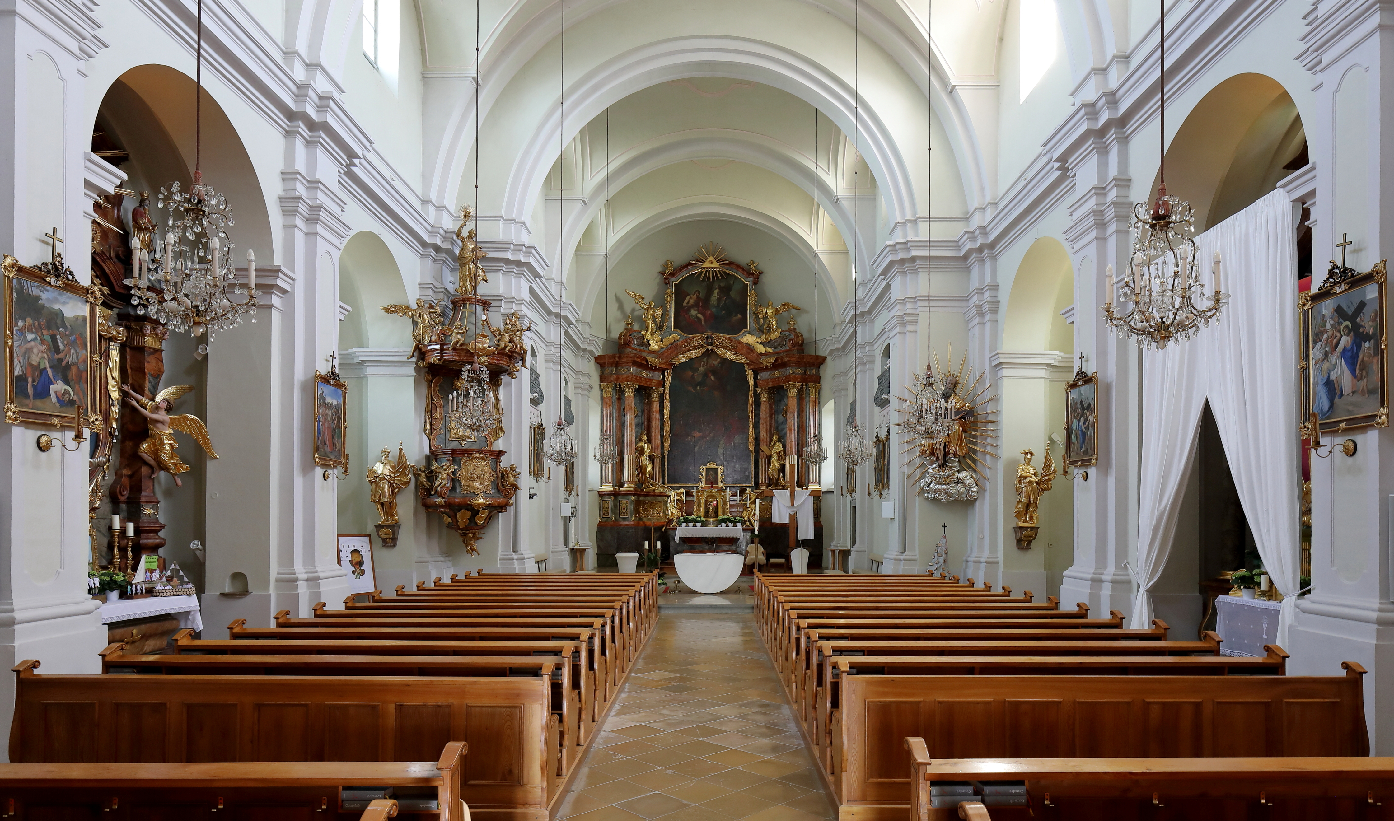 Innenansicht der röm.-kath. Pfarrkirche hl. Lorenz in der niederösterreichischen Marktgemeinde Loosdorf mit Blickrichtung Hochaltar. Die Kirche mit einem 4-jochigen Langhaus und einem eingezogenen 2-jochigen Chor wurde in den 1570er/1580er Jahren errichtet. Im zweiten Viertel des 18. Jahrhunderts fand eine Um- und Ausgestaltung der Kirche statt. Aus dieser Zeit stammt auch im Wesentlichen die heutige Ausstattung und Einrichtung.